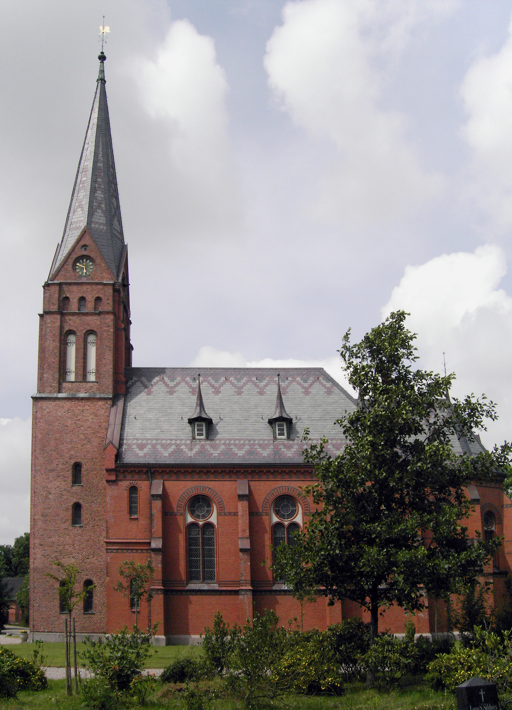 St.Gallus-Kirche Galmsbüll, Nordfriesland, Schlswig-Holstein, Deutschland